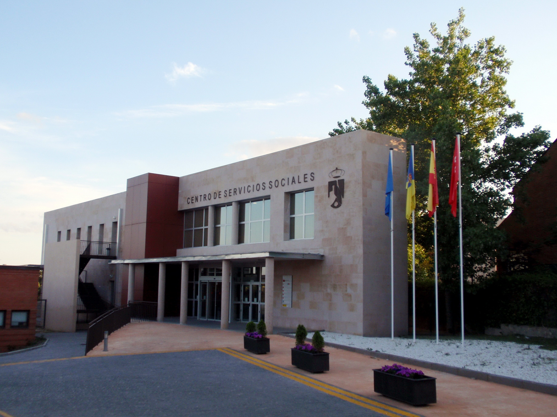 Torrelodones. Centro de Servicios Sociales.